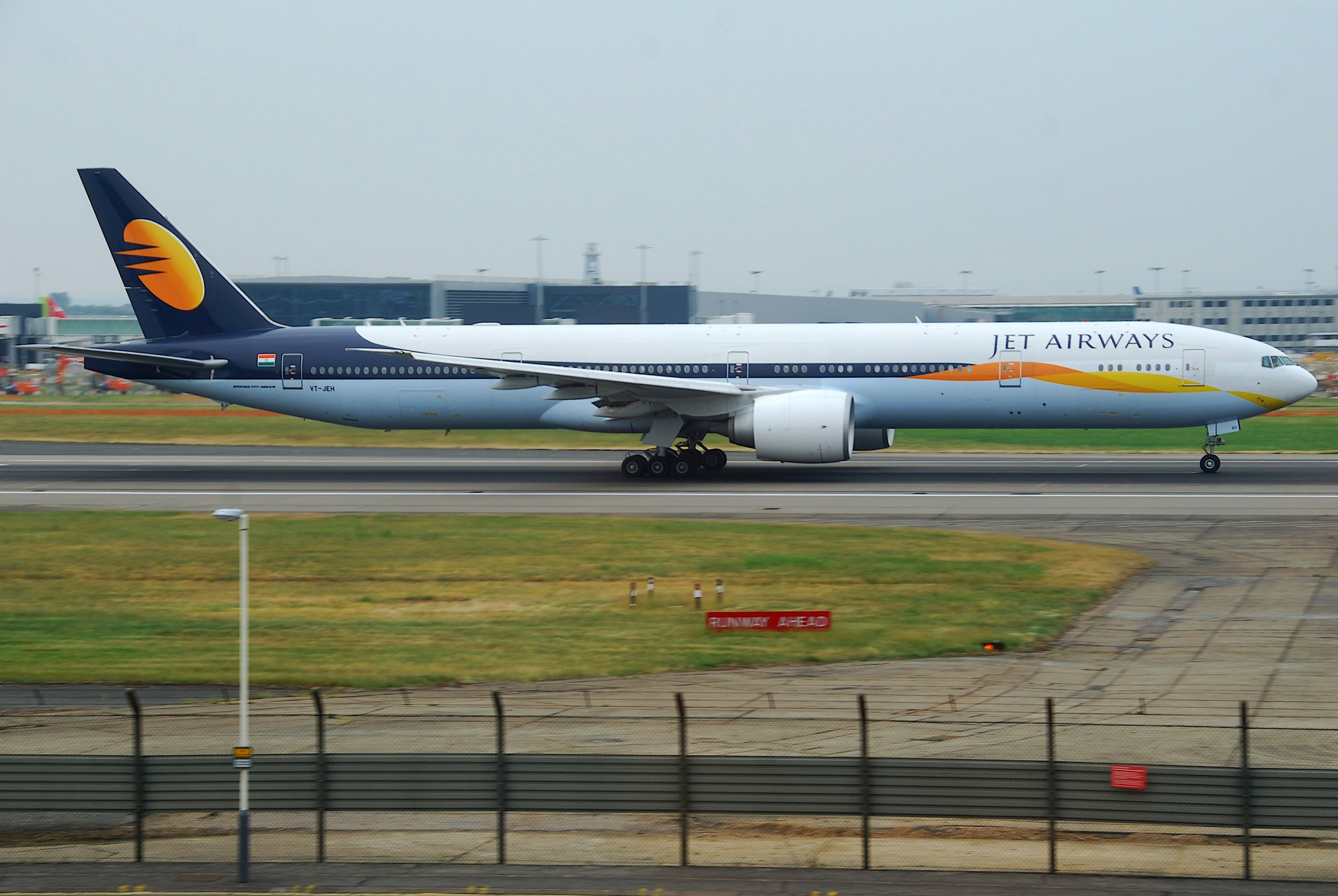 Jet Airways Boeing 777-35RER; VT-JEH@LHR;06.06.2010/577bg